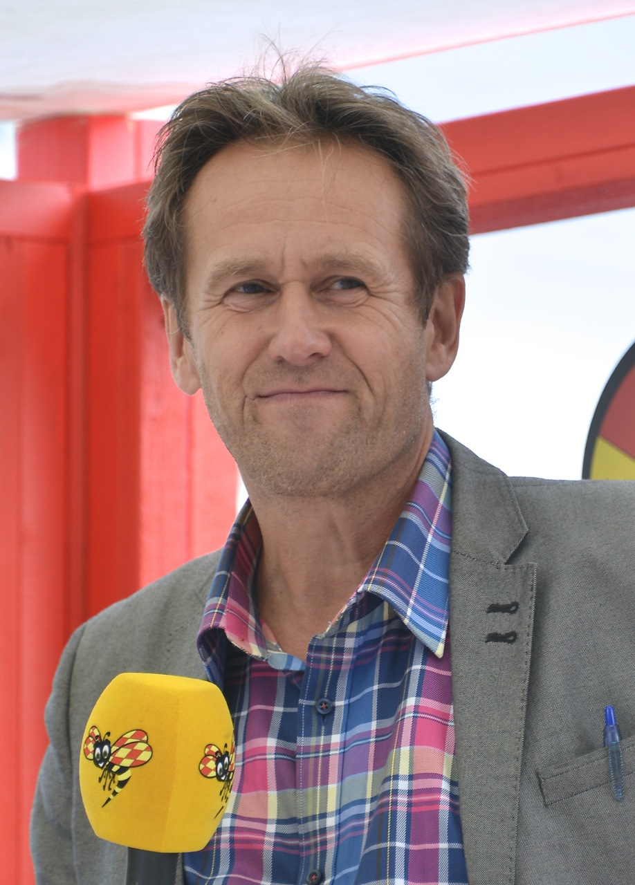 Svante Axelsson den 12 september 2014.